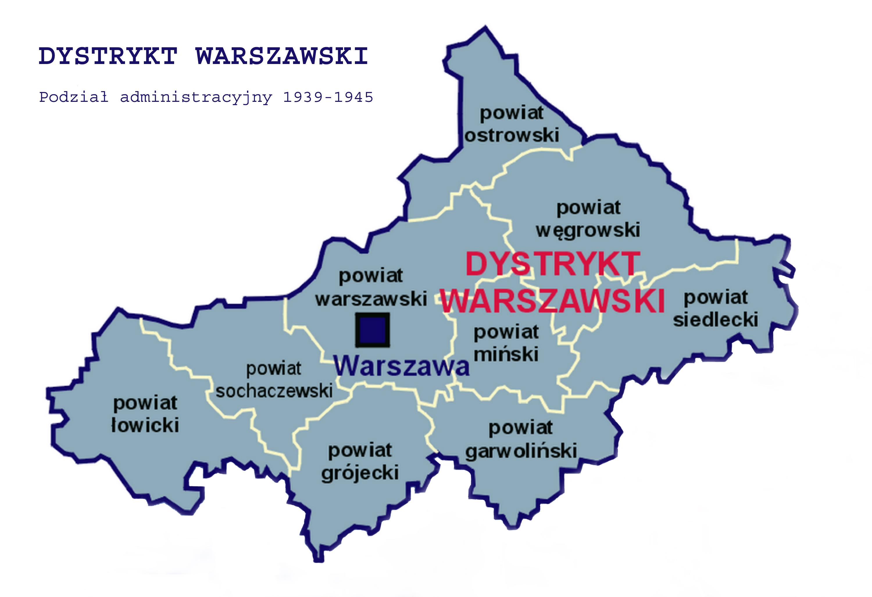 Dystrykt warszawski - 1939-45